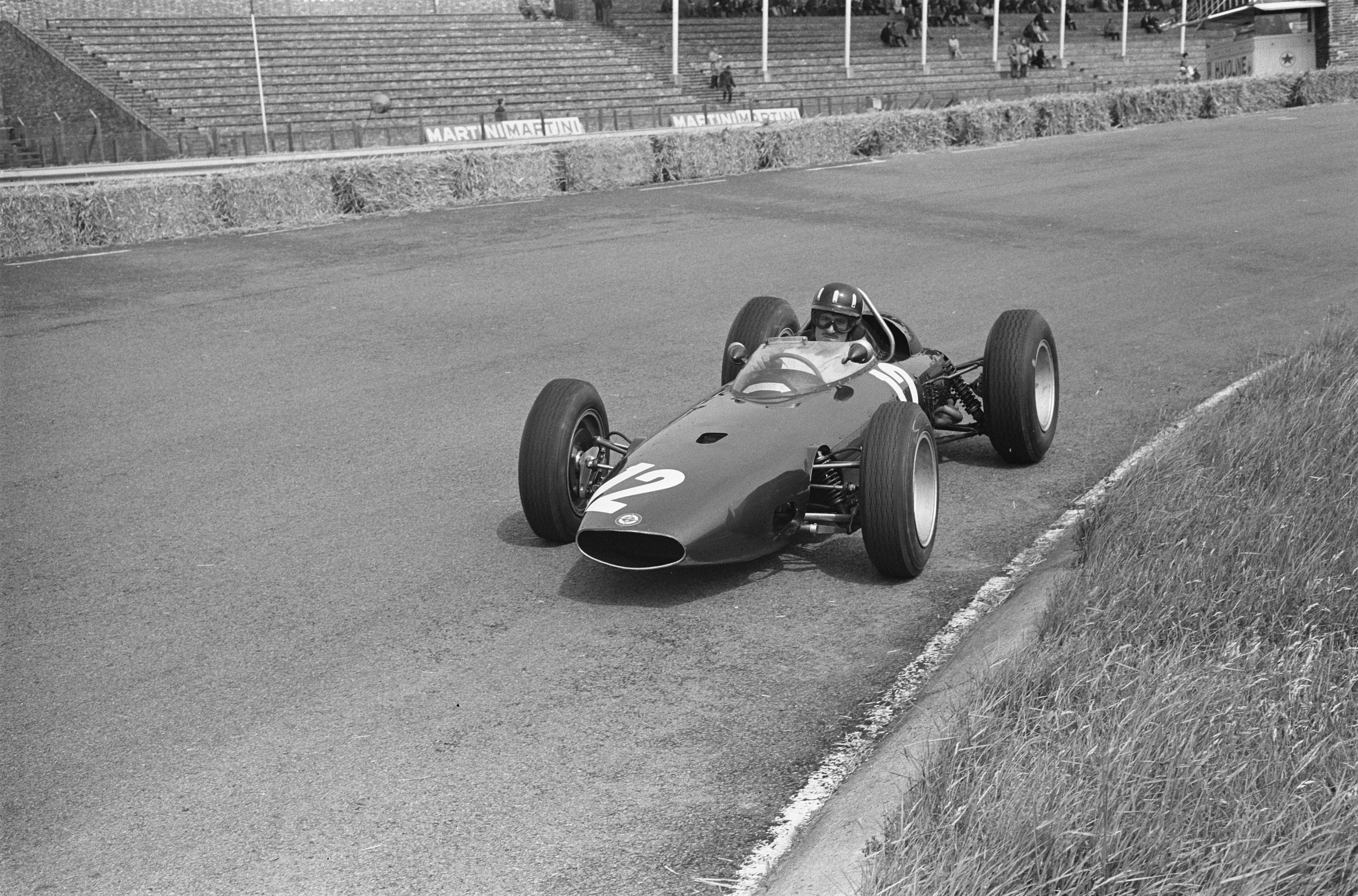 Collectie / Archief : Fotocollectie Anefo Reportage / Serie : [ onbekend ] Beschrijving : Training voor Grand Prix te Zandvoort begonnen. Graham Hill (12. BRM) in de Hugenhotzbocht Datum : 21 juni 1963 Locatie : Noord-Holland, Zandvoort Trefwoorden : autosport Persoonsnaam : Hill, Graham Fotograaf : Pot, Harry / Anefo Auteursrechthebbende : Nationaal Archief Materiaalsoort : Negatief (zwart/wit) Nummer archiefinventaris : bekijk toegang 2.24.01.05 Bestanddeelnummer : 915-2840